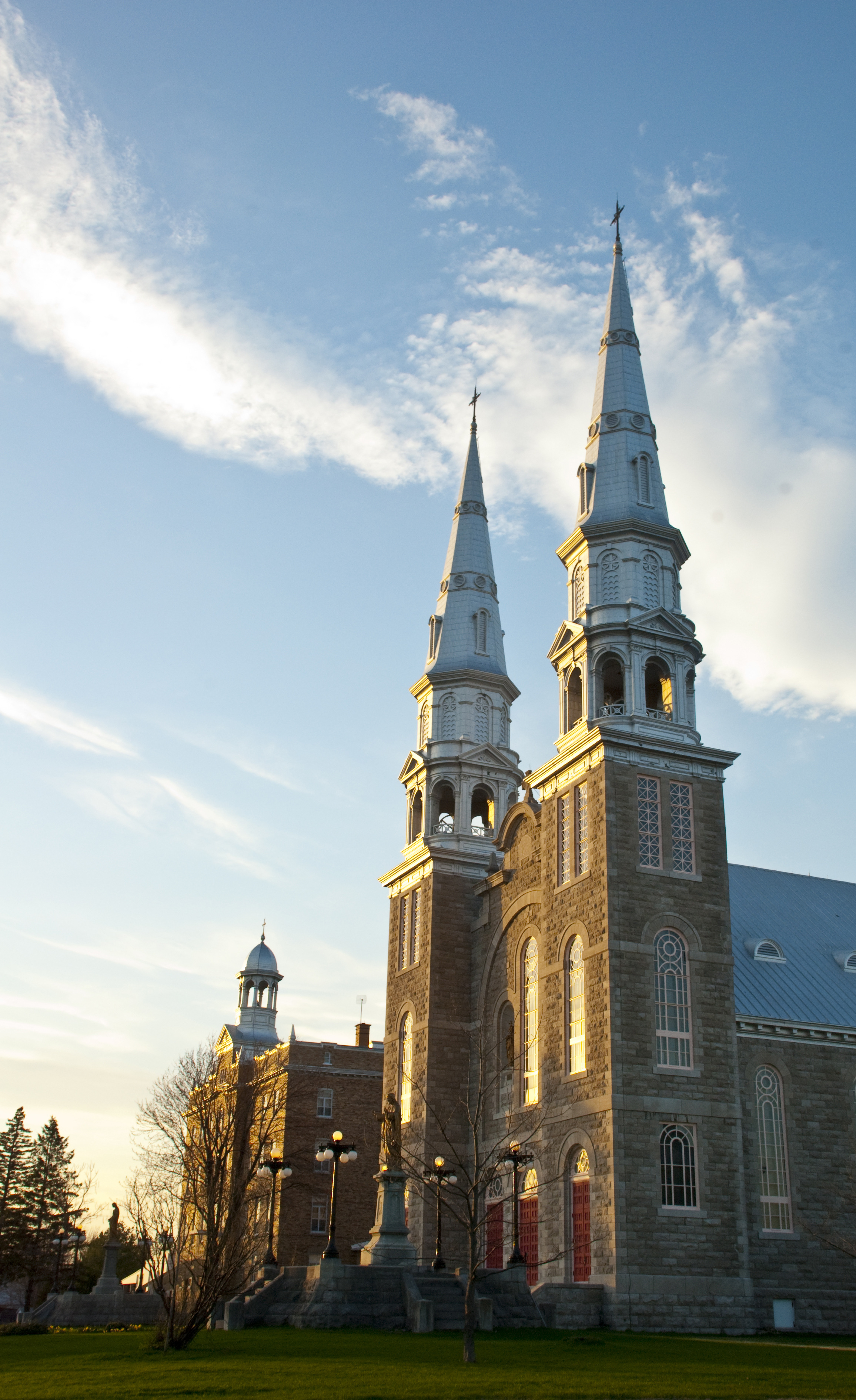 L'église de Saint-Jacques fut érigée durant la période 1915-1918. Elle remplace un édifice du début du XIXe siècle qui avait malheureusement été détruit par les flammes en 1914. Le 25 mai suivant, après la bénédiction des cinq cloches qui ornent encore aujourd'hui le clocher, ce faisait l'ouverture aux fidèles pour la première cérémonie religieuse. Tous les éléments architecturaux de l'ensemble de l'église sont inspirés du style néo-classique avec une touche légèrement néo-romane tandis que l'intérieur emprunte le style architectural des Caron de Nicolet. Le bois compose la structure ornementale intérieure, ce qui confère à l'édifice une excellente acoustique. De plus, l'édifice en impose par ses dimensions ; très peu d'églises lui sont comparables. Une œuvre monumentale et majestueuse, sise au milieu d'une vaste plaine et dominant la région immédiate avec ses deux immenses flèches qui crèvent le ciel.